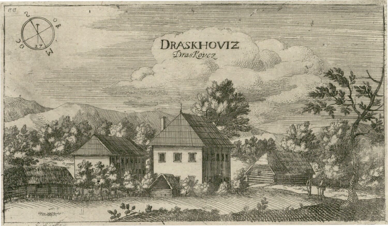 Drašković